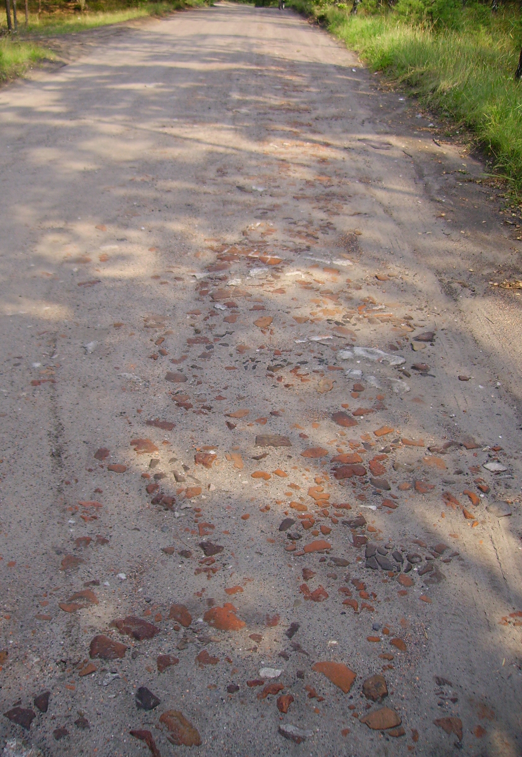 Droga rokadowa Przedmoście Warszawskie